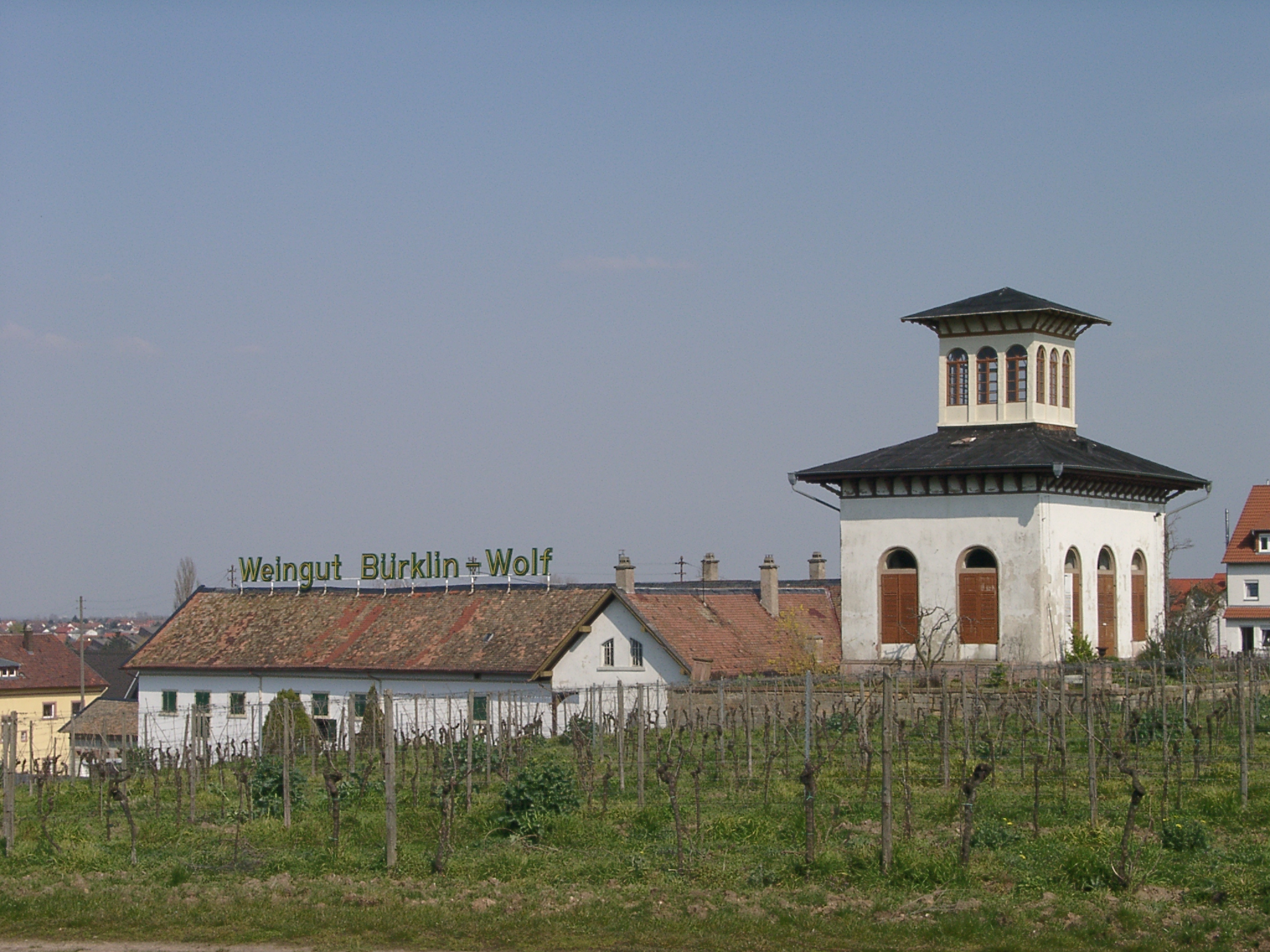 Das Teehaus in Ruppersberg